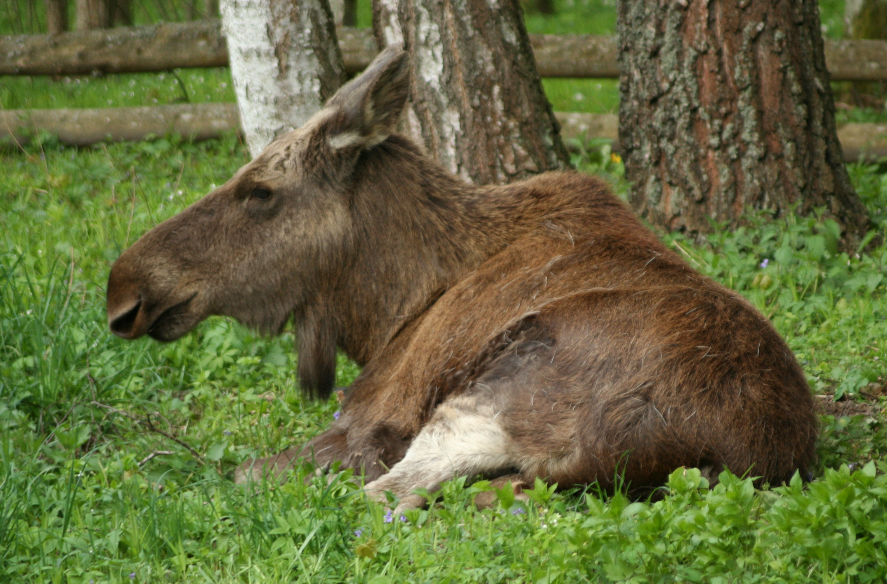 Alces_alces